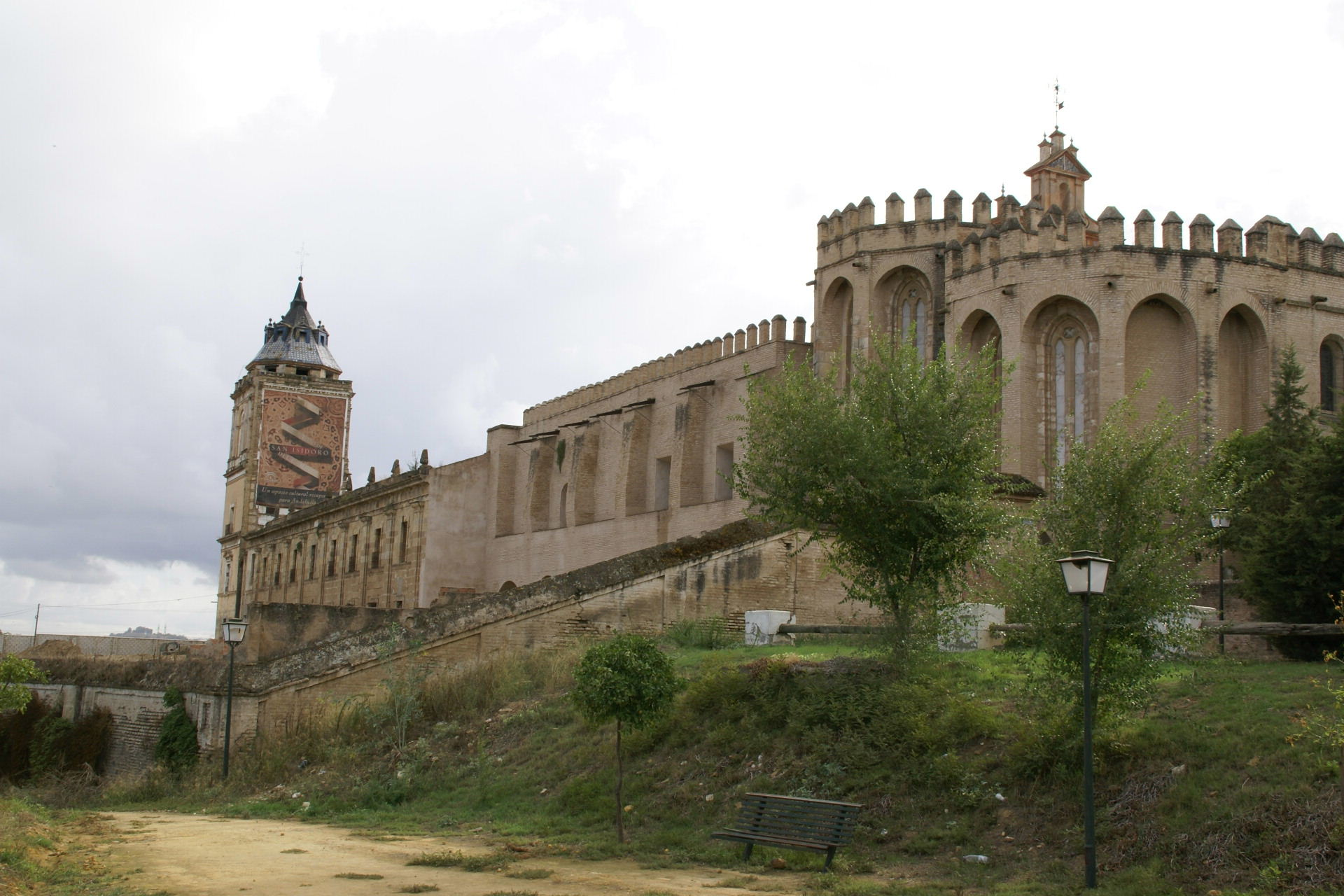 Monastery of San Isidoro del Campo, Santiponce (Seville), Spain